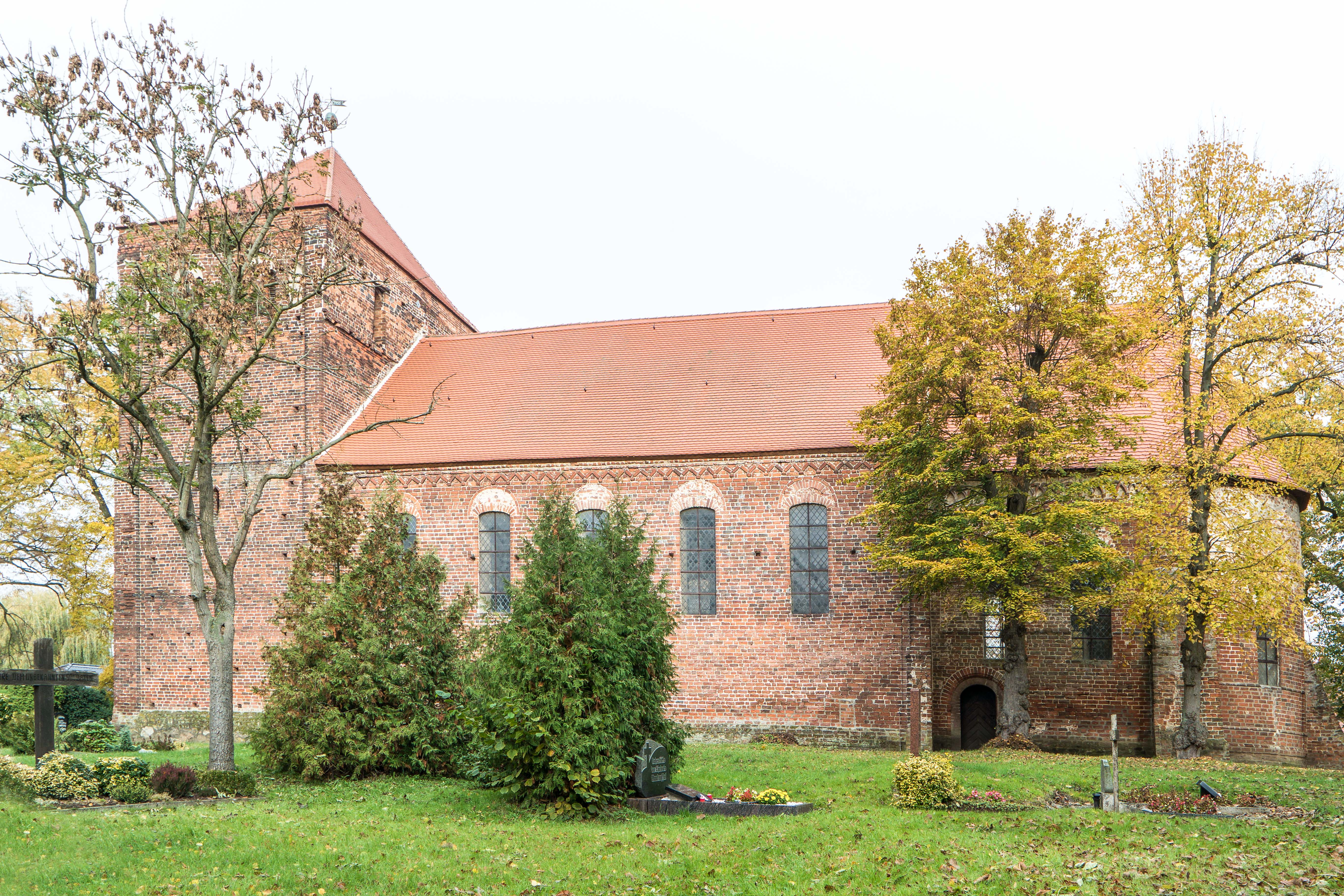 Kirche St. Nikolaus, Deichstraße in Berge OT der Hansestadt Werben (Elbe)